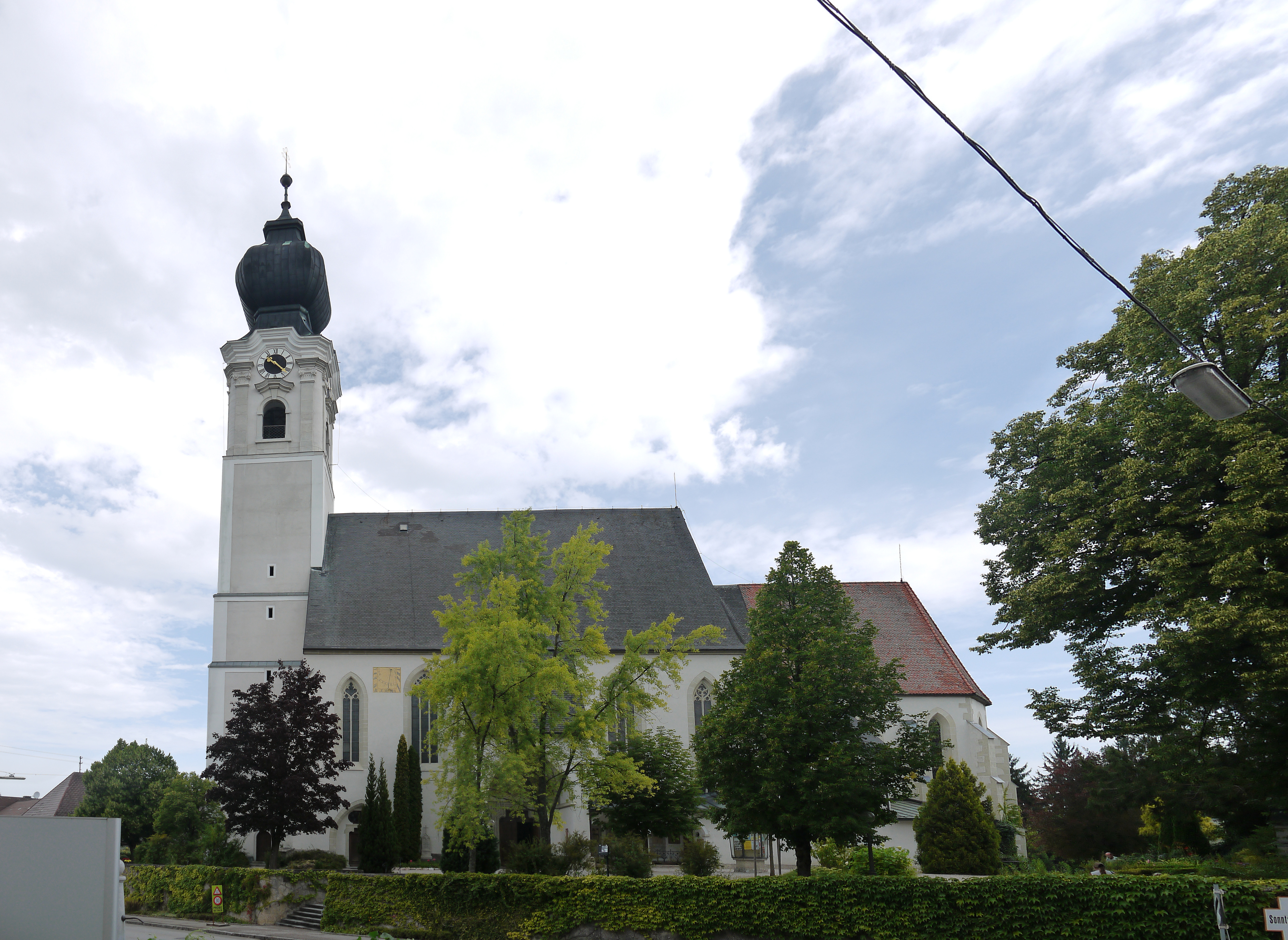 Kath. Pfarrkirche hl. Georg und Kriegerdenkmal